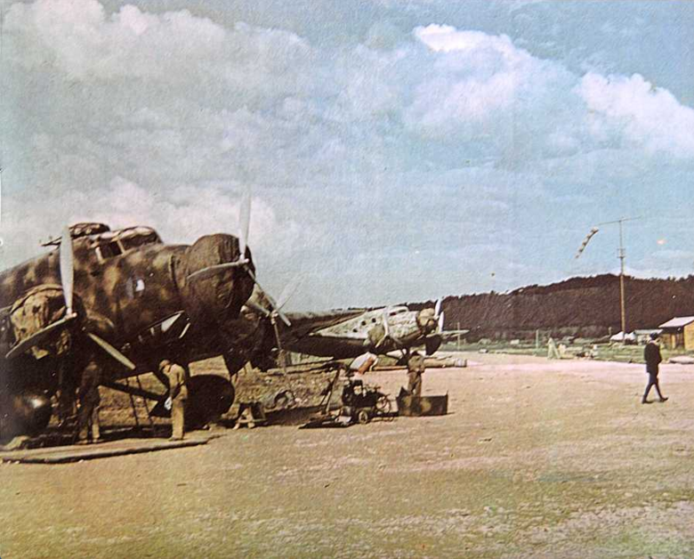 SM.81 pipistrello immagine a colori